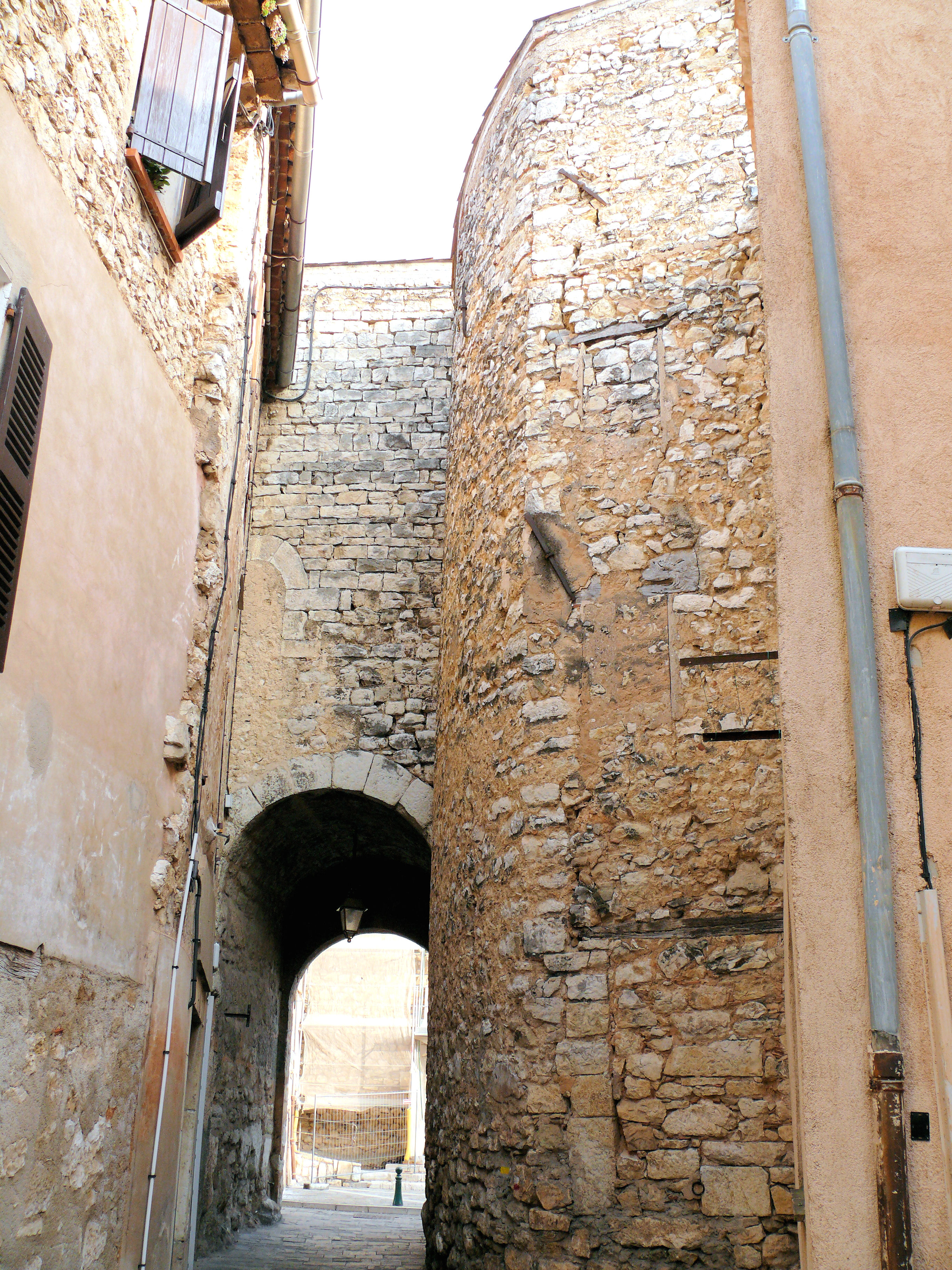 Saint-Cézaire-sur-Siagne - Porte devant l'église